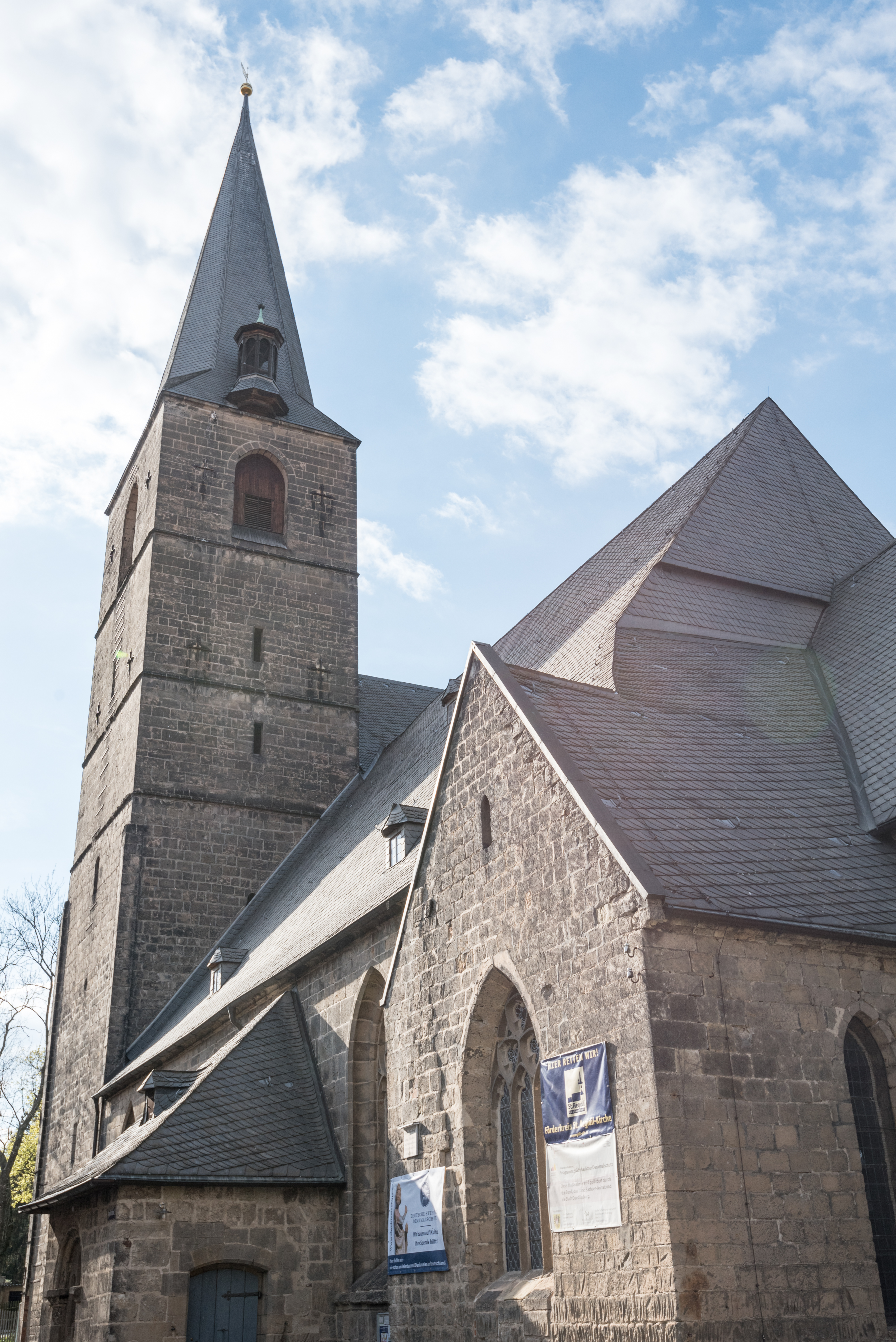 Quedlinburg, Aegidiikirchhof 1, Aegidiikirche